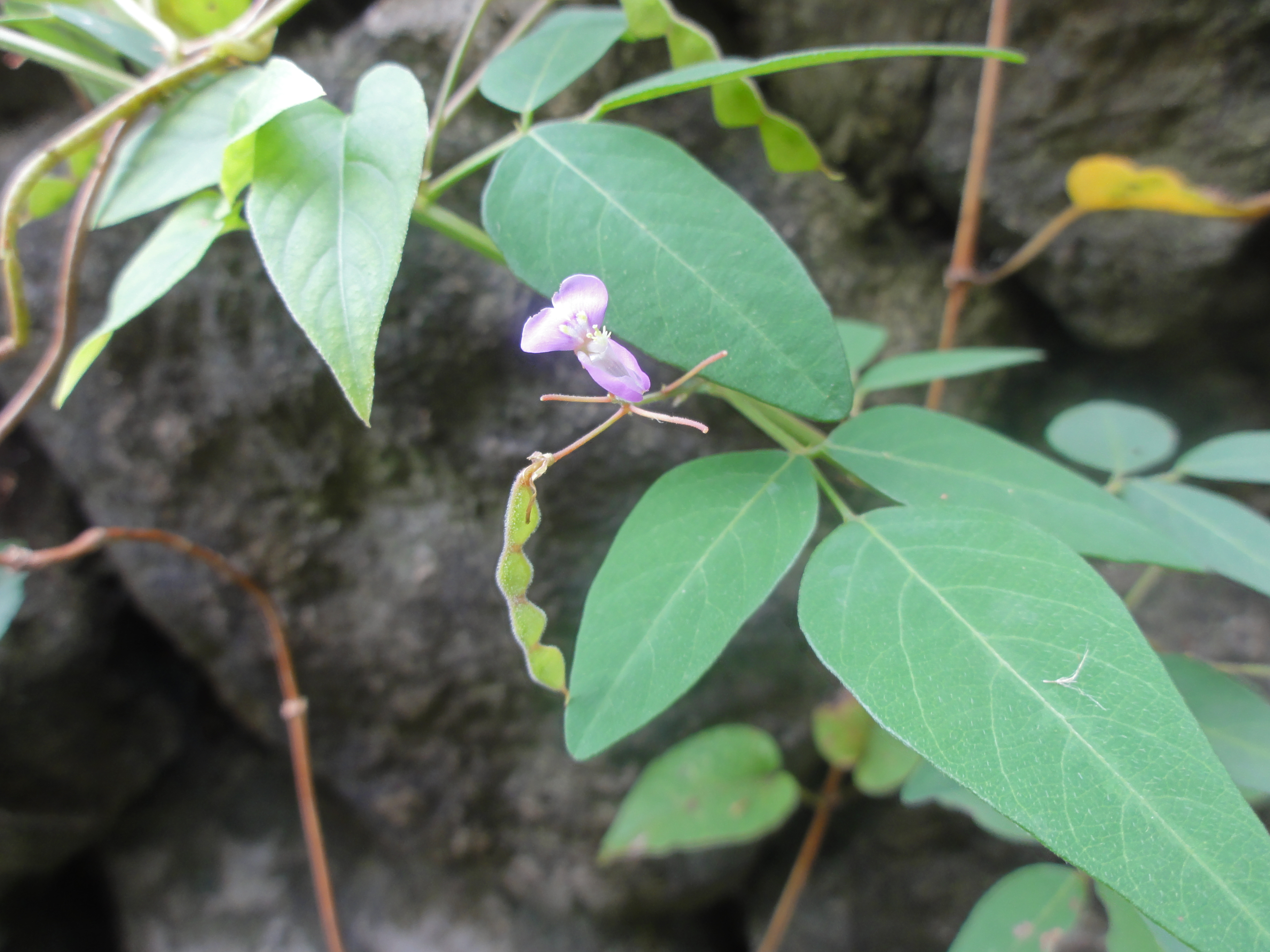 ヌスビトハギ[盗人萩][Desmodium podocarpum subsp. oxyphyllum]-花と実